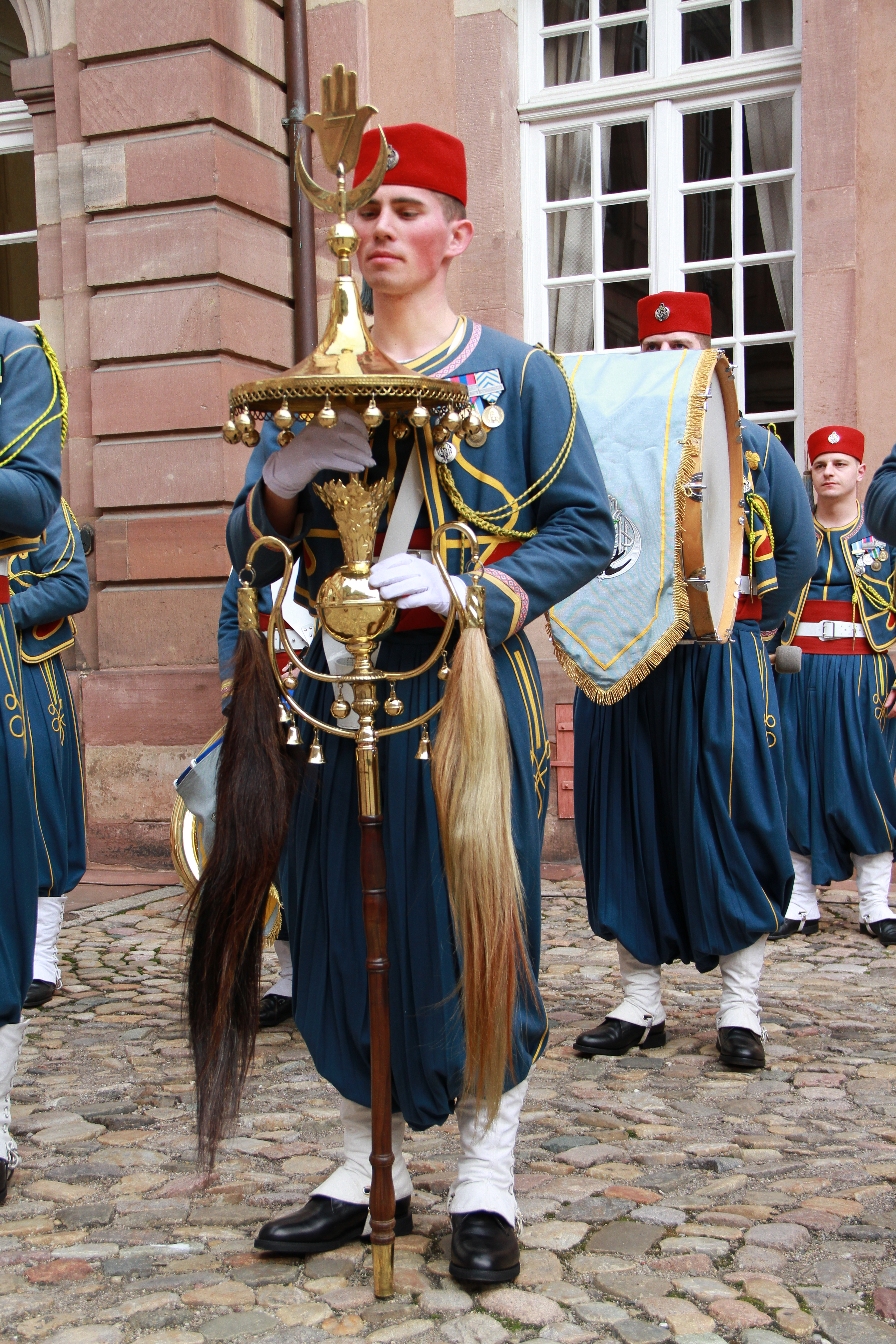 La Nouba du 1er Régiment de Tirailleurs d'Épinal en tenue de Tradition lors de la prise d'armes au Palais du gouverneur militaire de Strasbourg, le 31 janvier 2013, en présence du général Bertrand Ract-Madoux, chef d’état-major de l’armée de terre à l’occasion du retour en France de la Task force Lafayette.